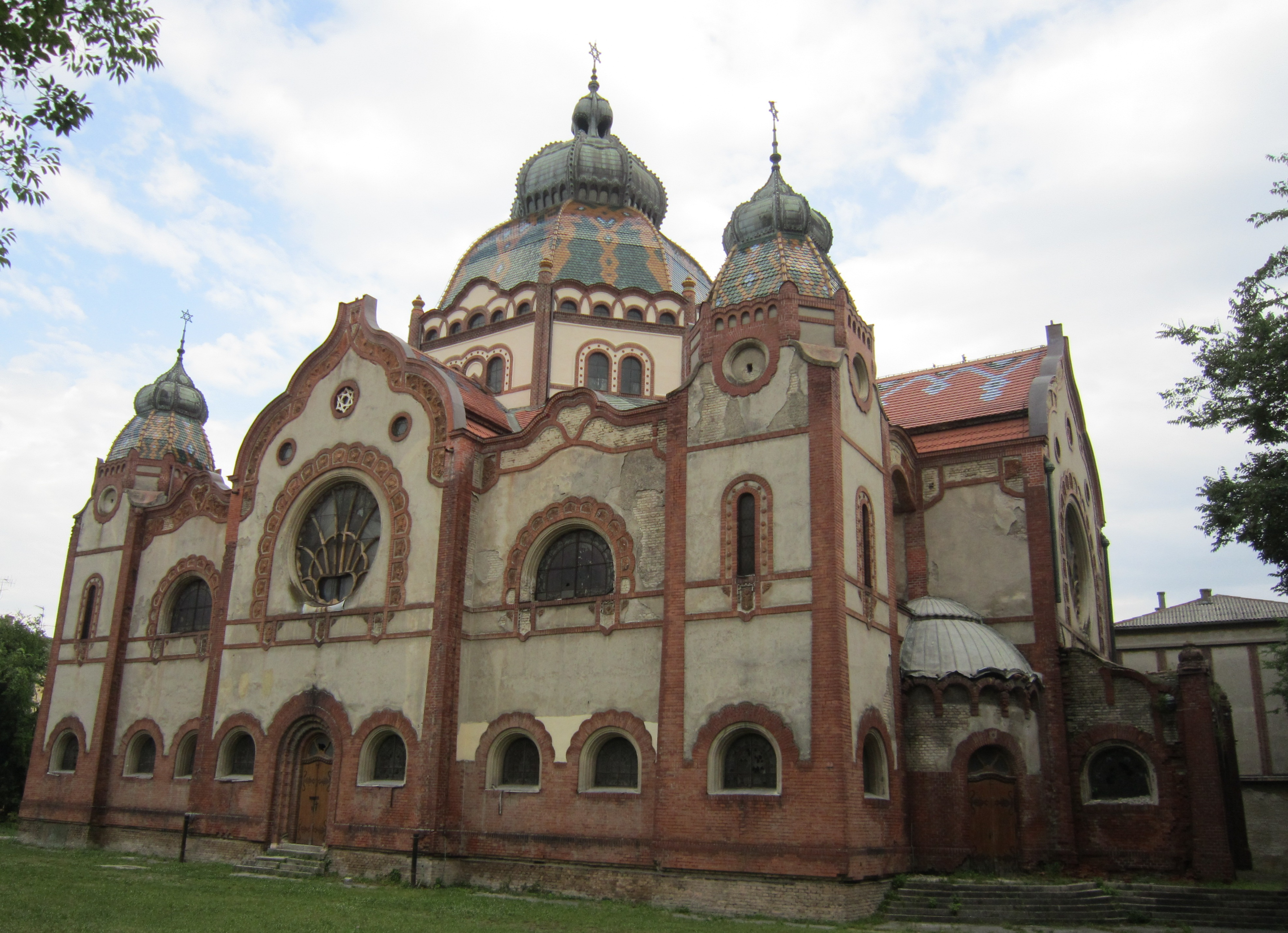 Servië - Subotica - Synagoge